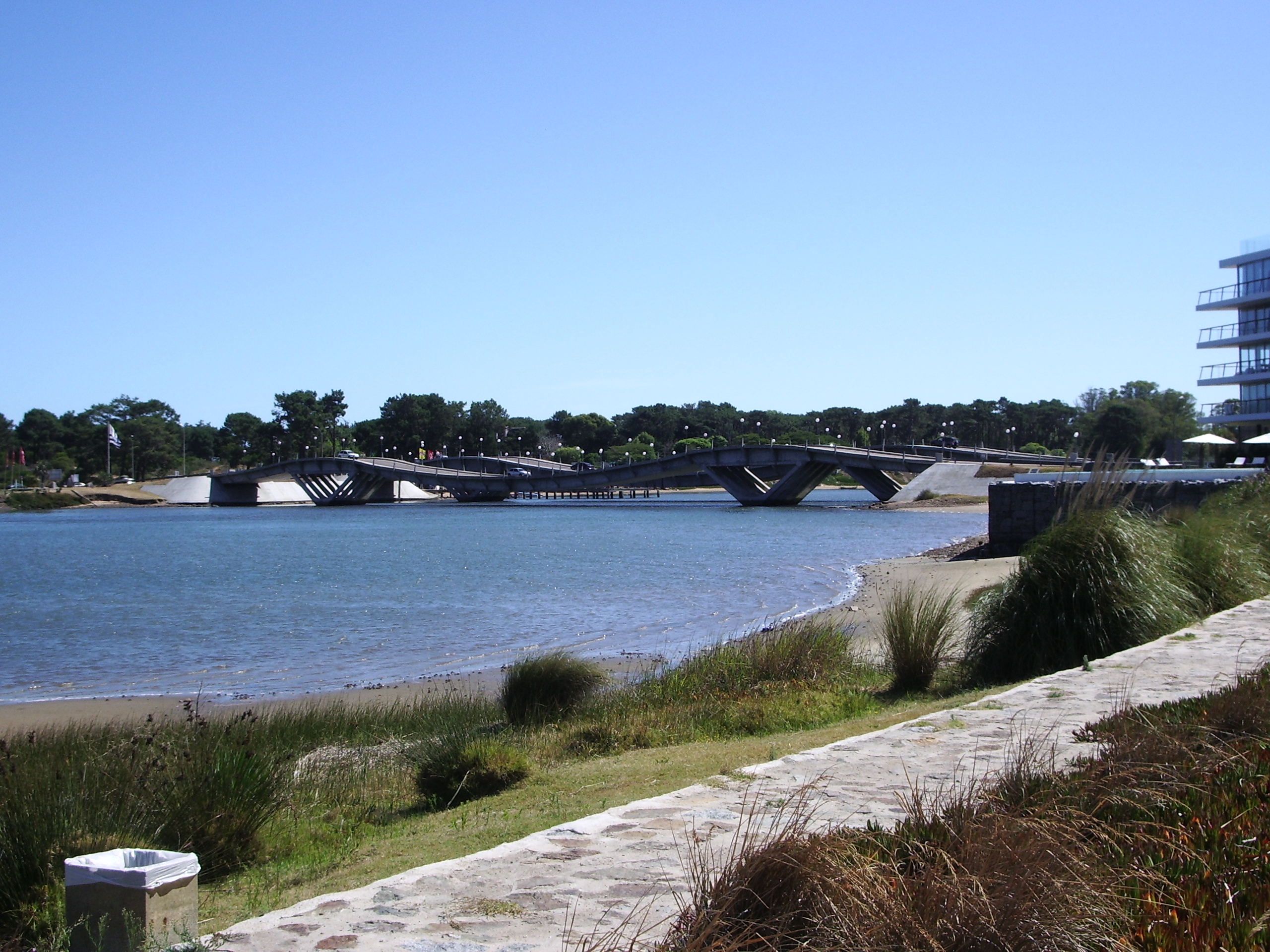 Foto con los dos puentes en La Barra, Uruguay